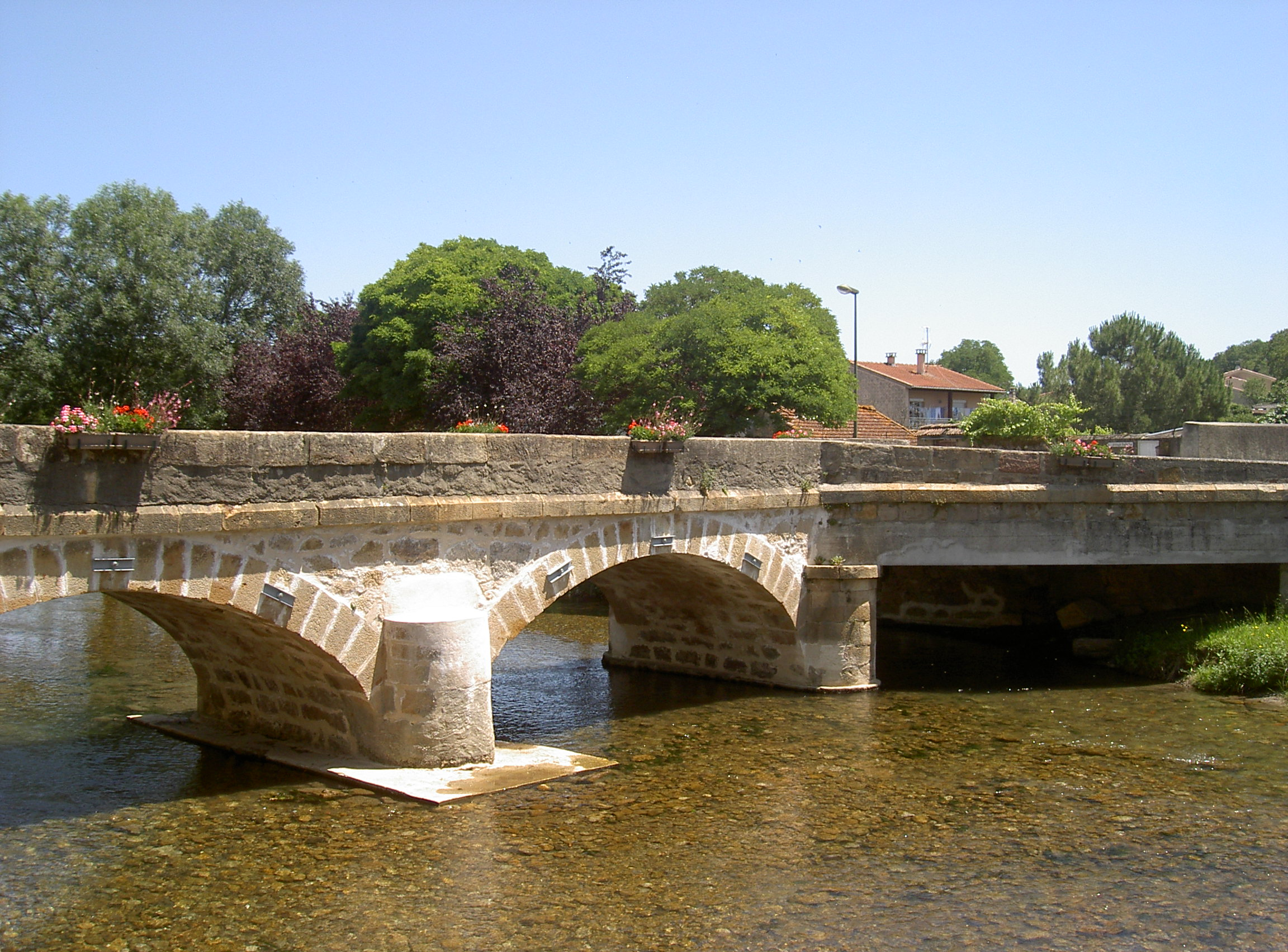 Pont La Bastide sur l'Hers (Ariège)